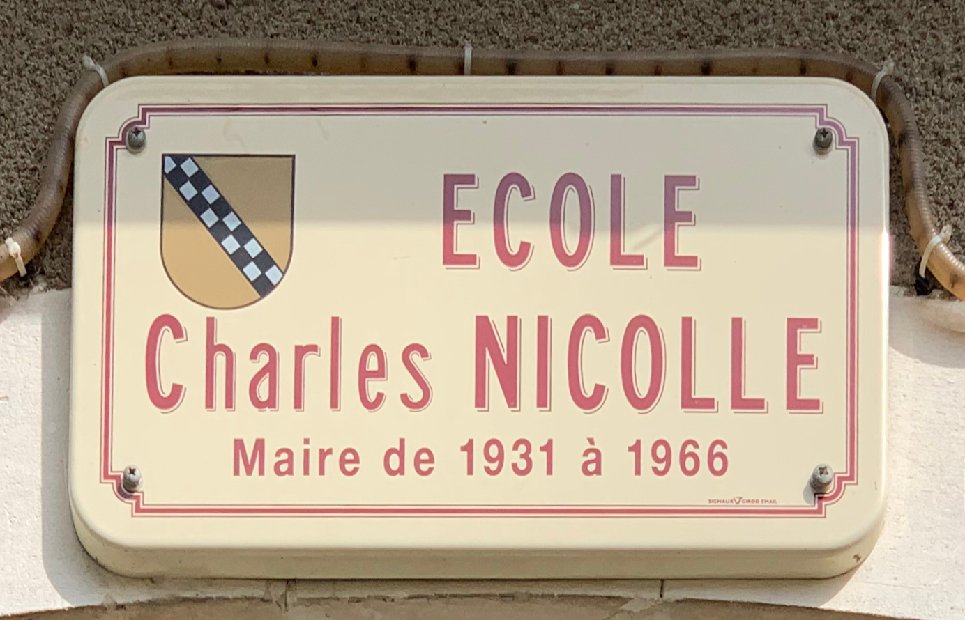 Panneau école Charles Nicolle à Sougères-en-Puisaye (avril 2019).